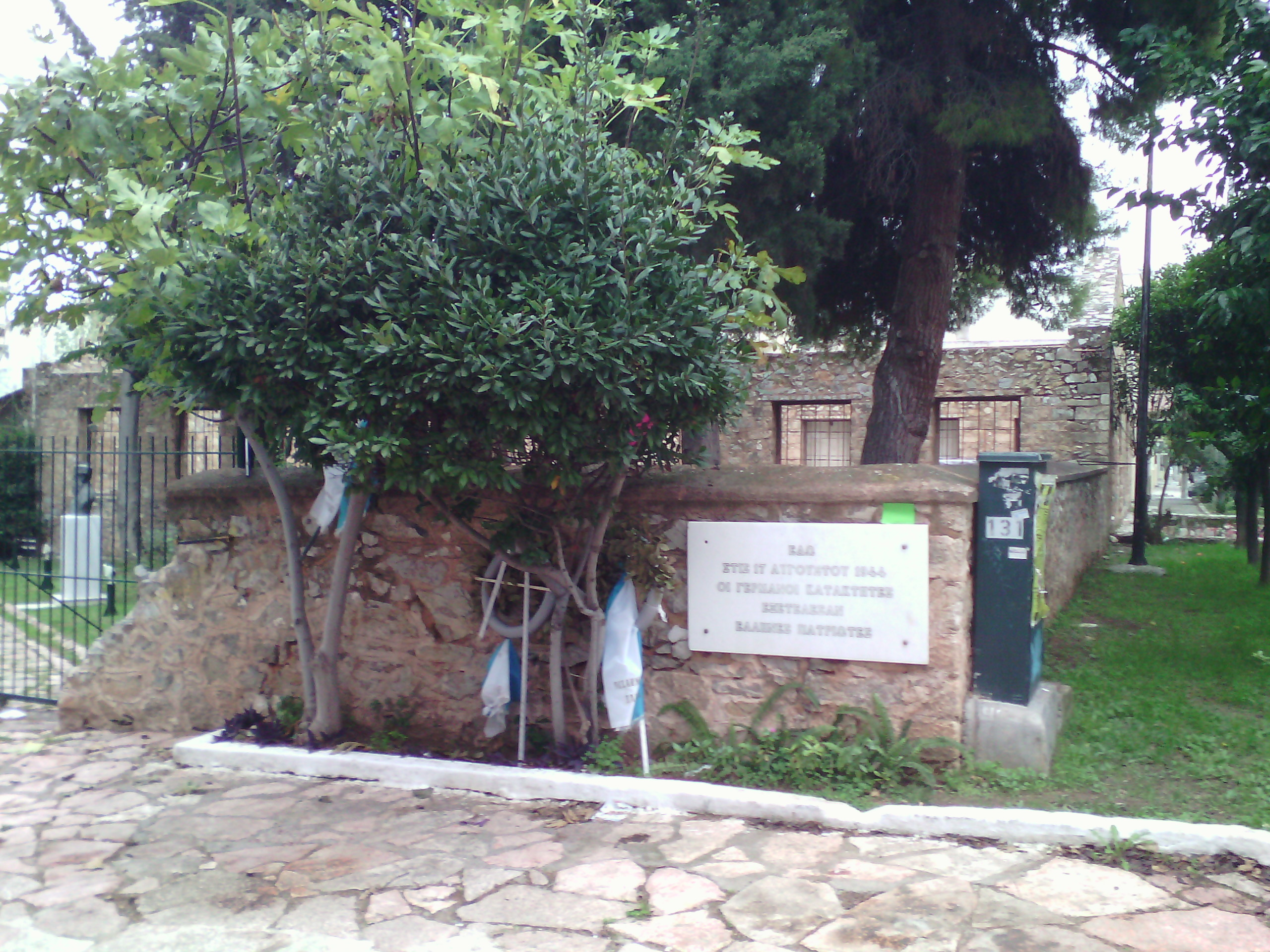 Ο μνημειακός χώρος της Μάντρας Μπλόκου της Κοκκινιάς